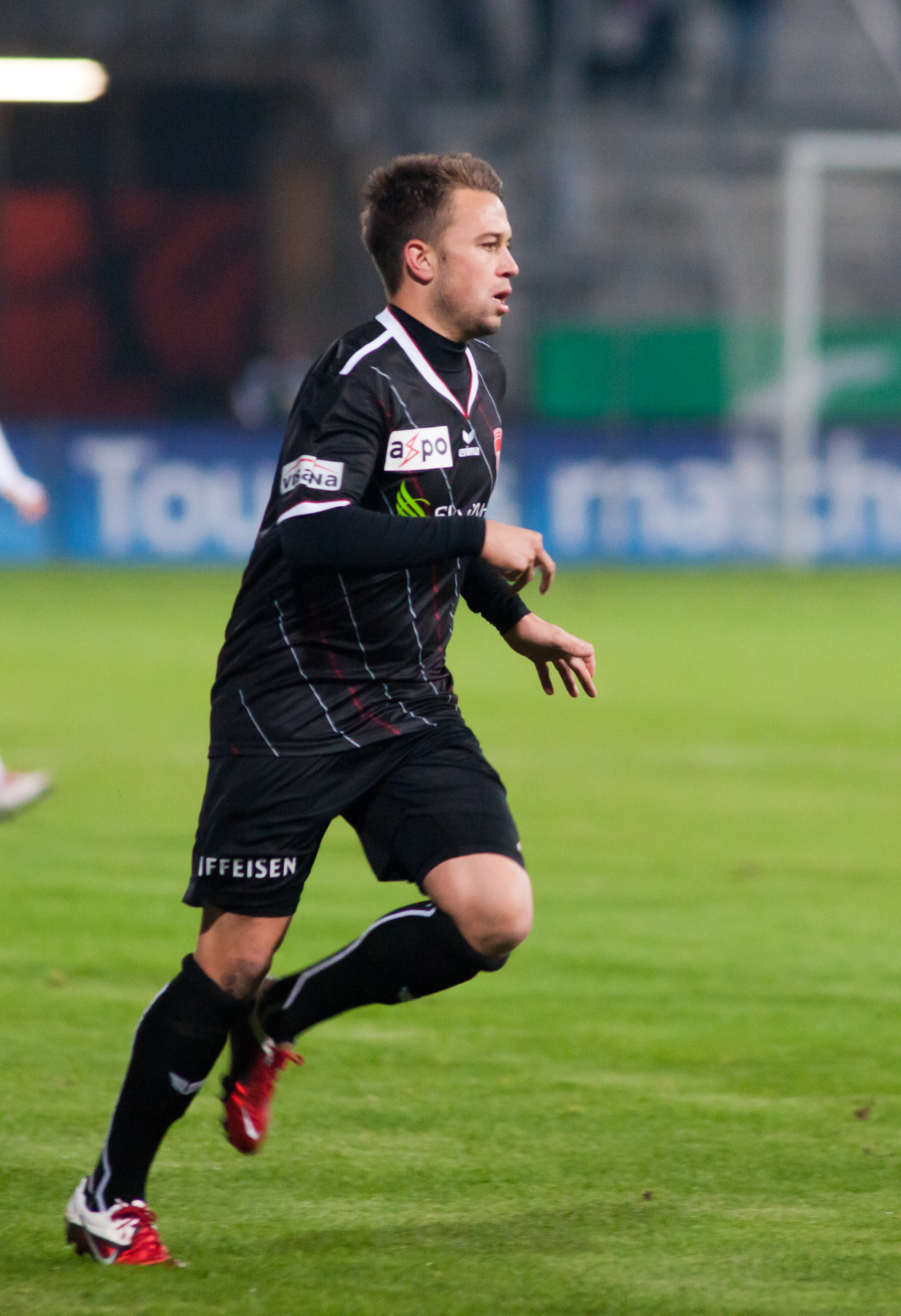 Lausanne Sport vs. FC Thun - 22.10.2011